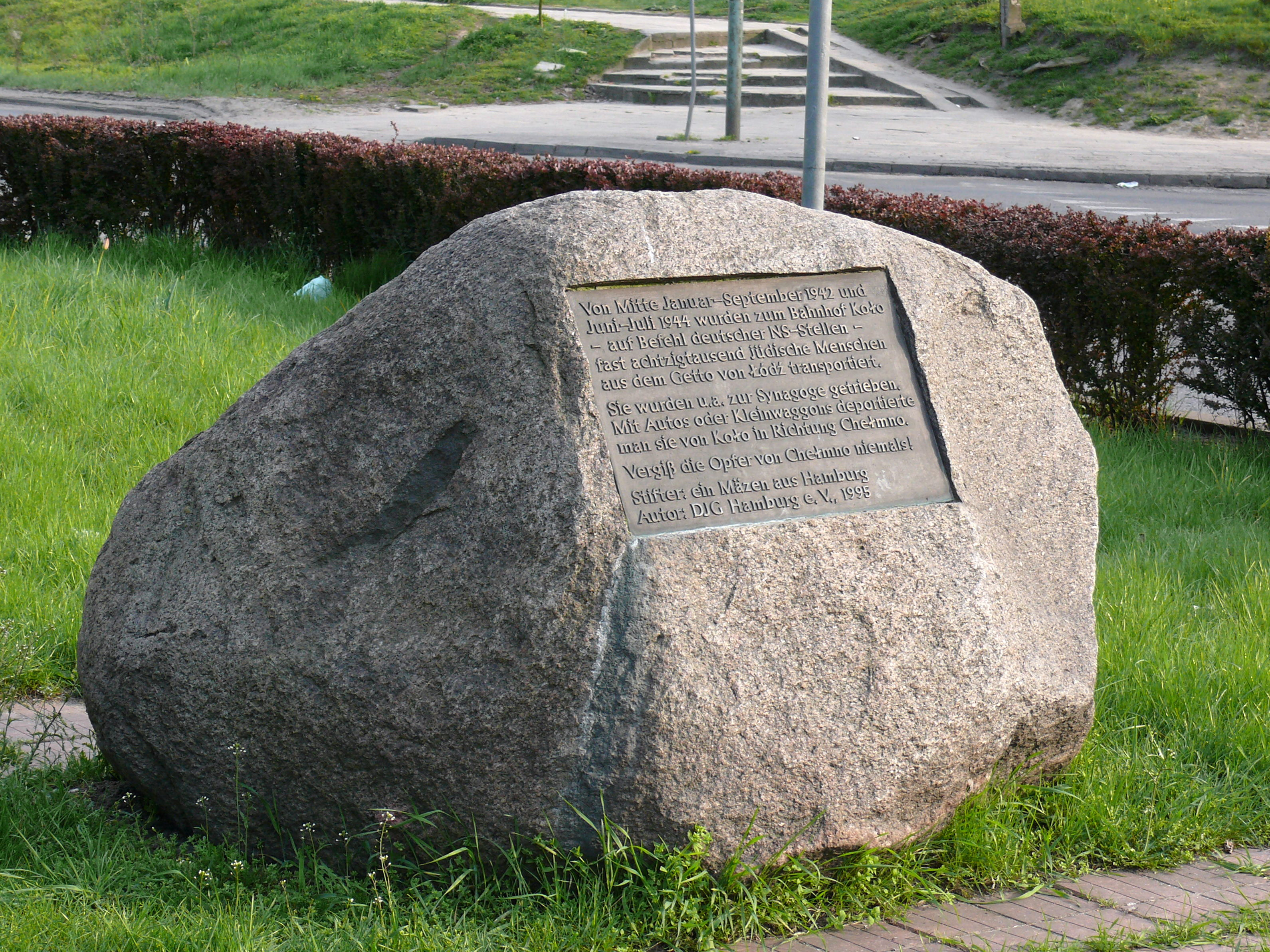 Głaz upamiętniający Żydów przed kolskim dworcem kolejowym